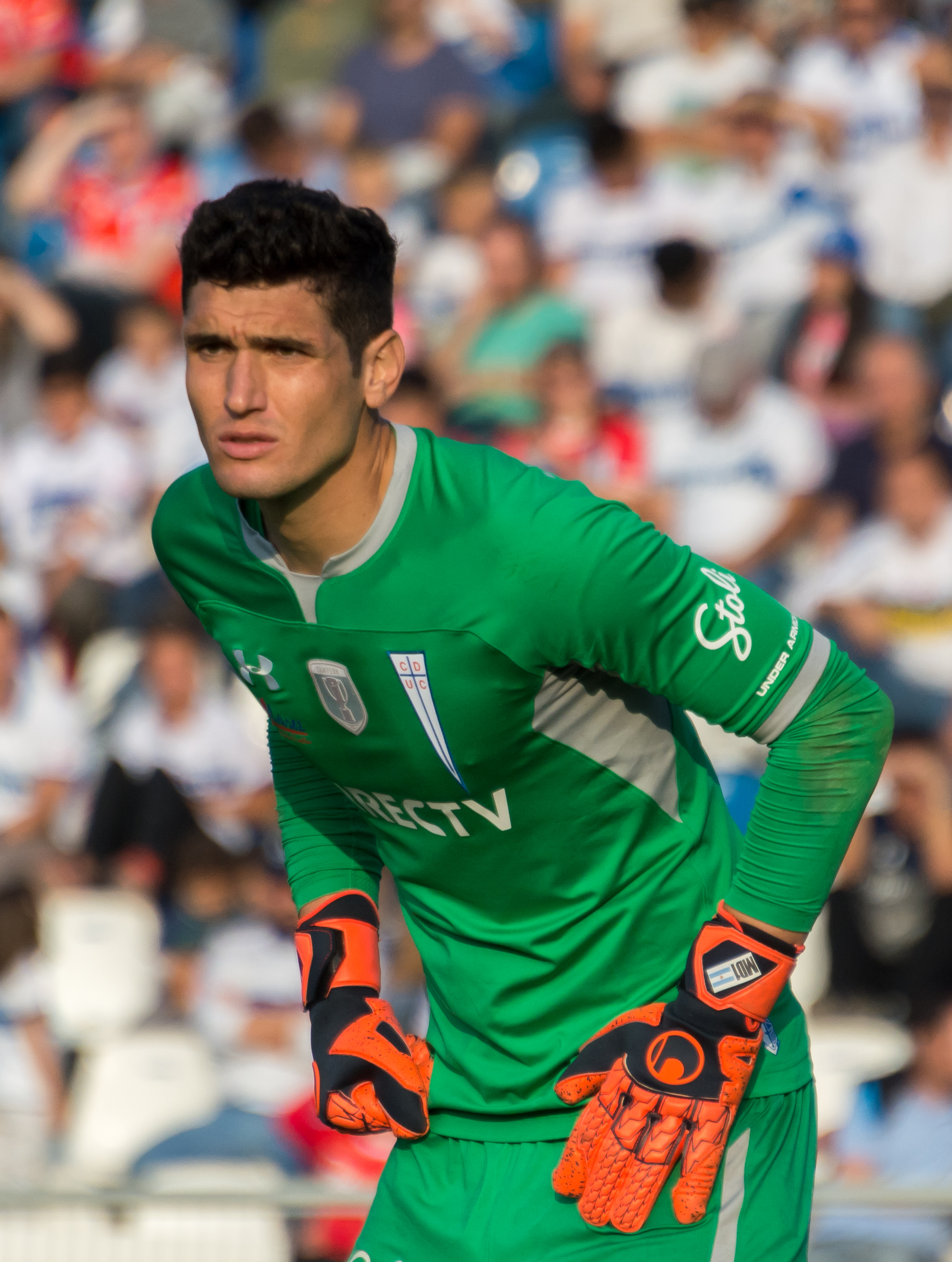 Matías Dituro, Universidad Católica v Curicó Unido, Estadio San Carlos de Apoquindo, Las Condes, Santiago, Región Metropolitana, Chile.